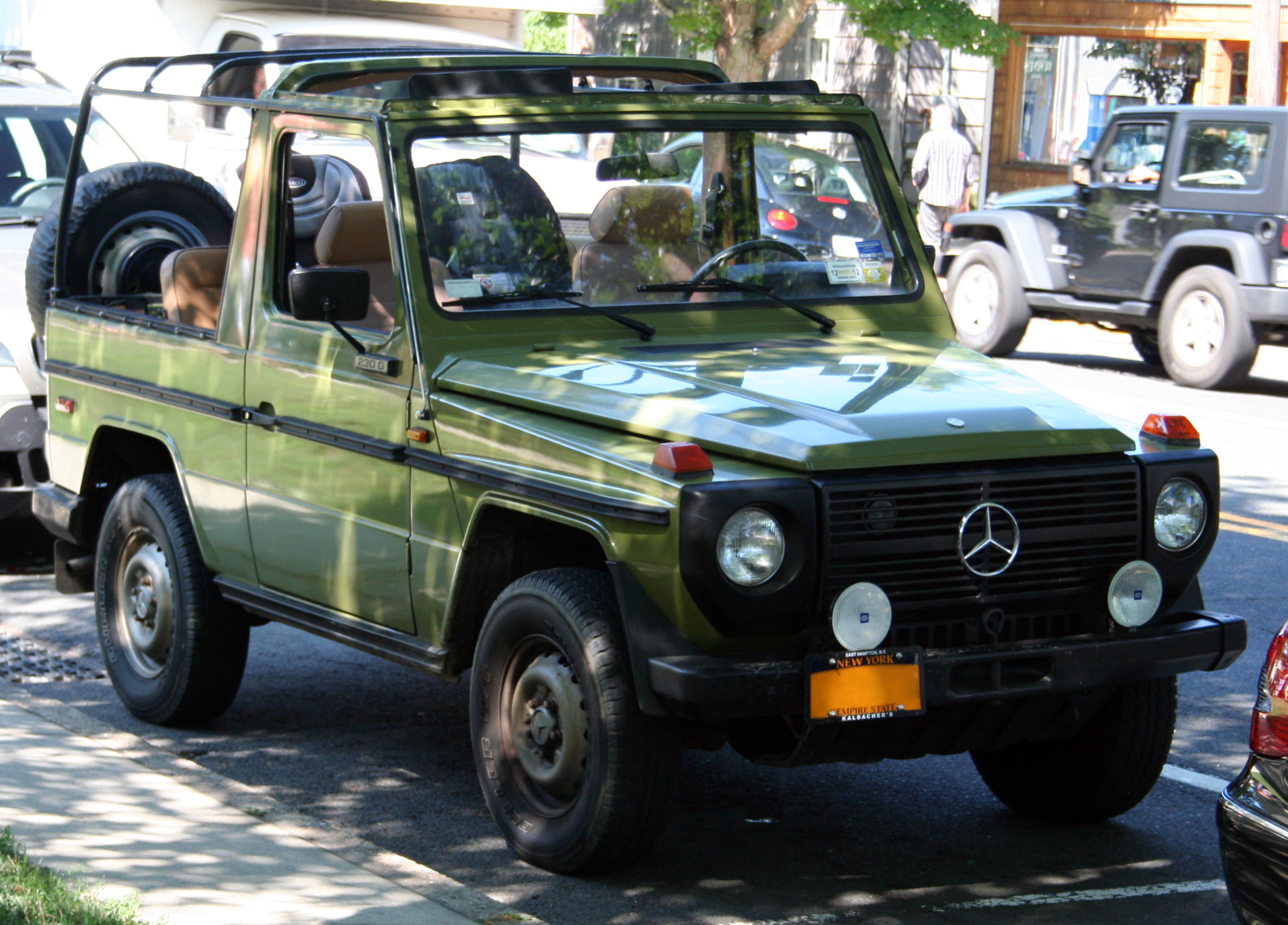 1979-1982 Mercedes-Benz 230G Cabriolet